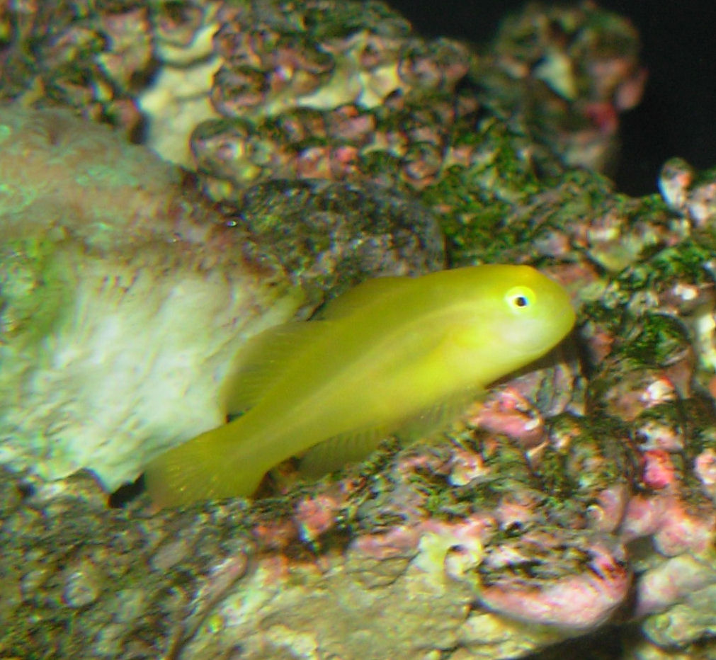 Yellow clown goby